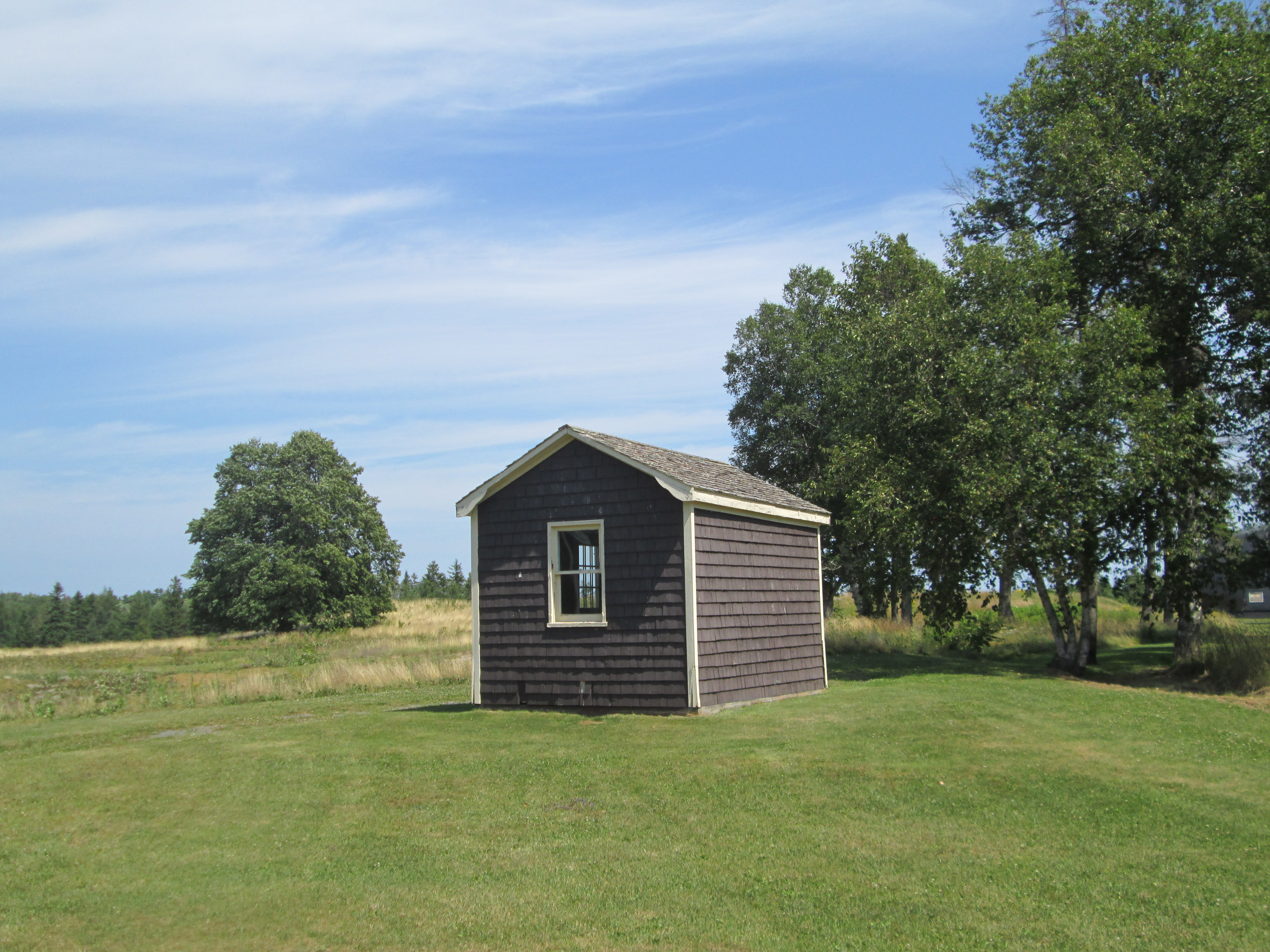 August 5, 2016